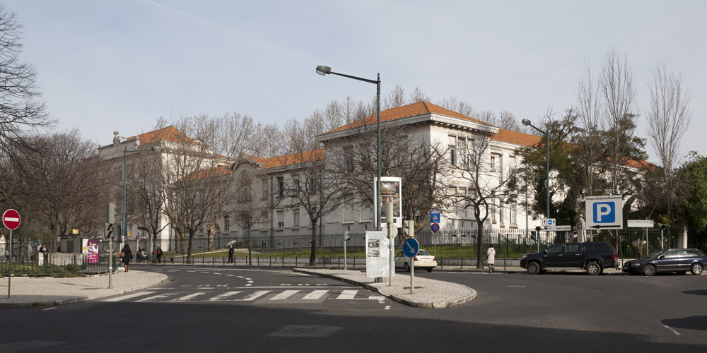 Liceu Camões (Escola Secundária Camões), Lisboa; Arq. Ventura Terra